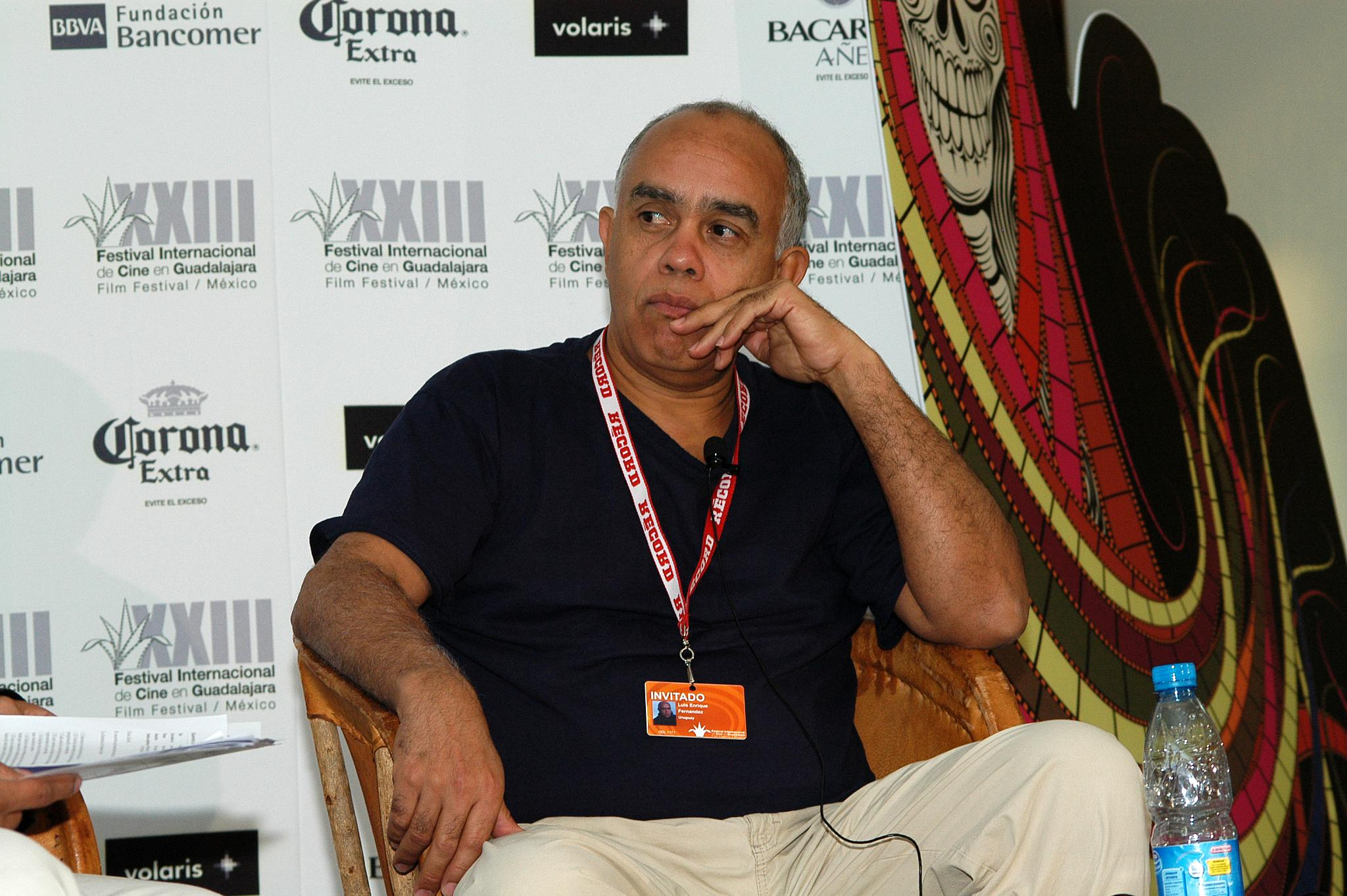 Guadalajara, Jalisco, 7 de marzo de 2008. Enrique Fernández, director de la película el Baño del Papa, en su encuentro con los medios.